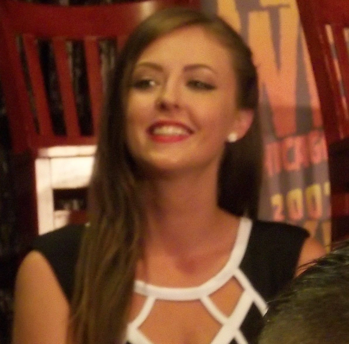 Sylvia Soska, Jen Soska, and Katharine Isabelle